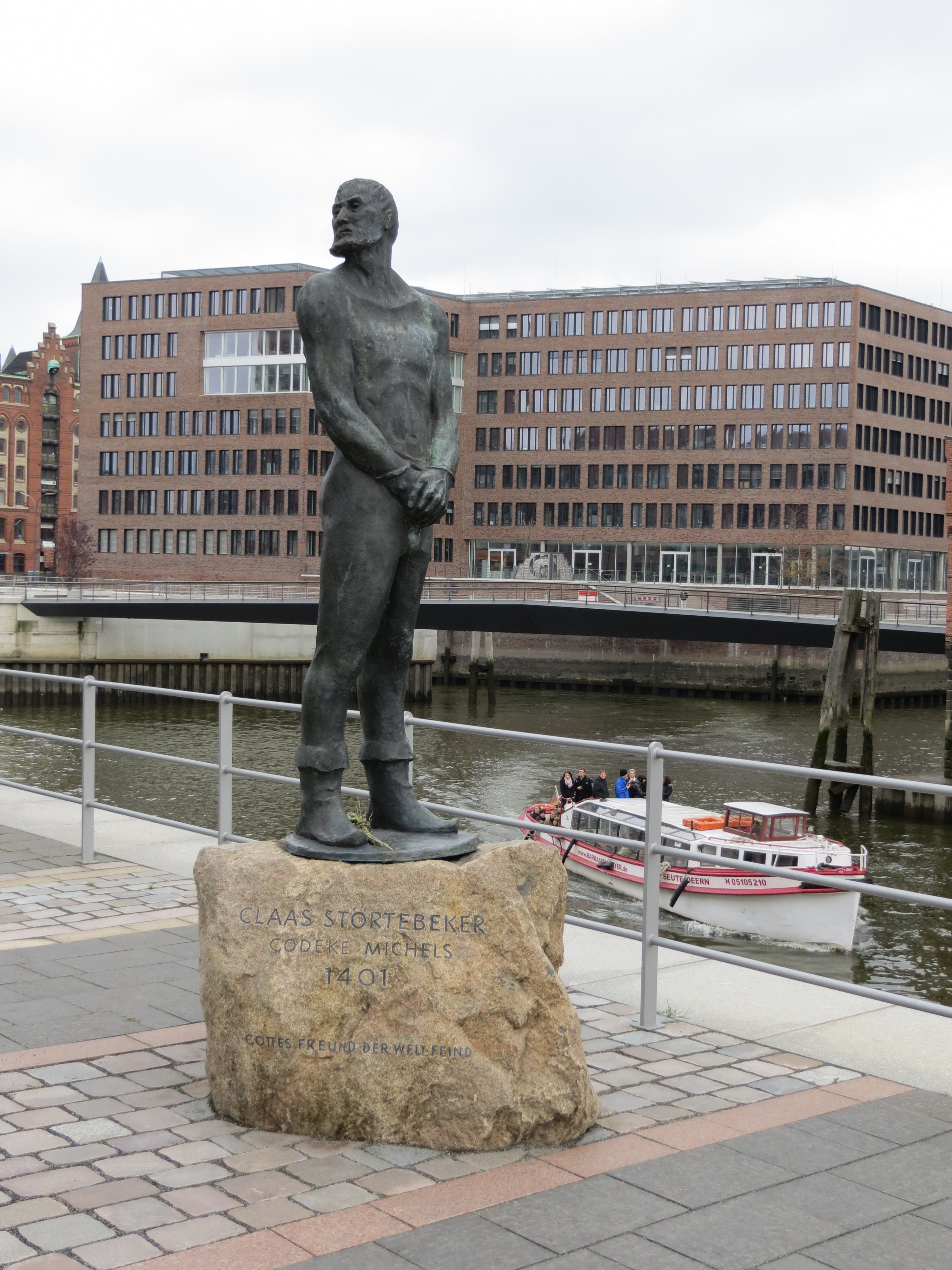 Klaus Störtebeker Statue (Hamburg)